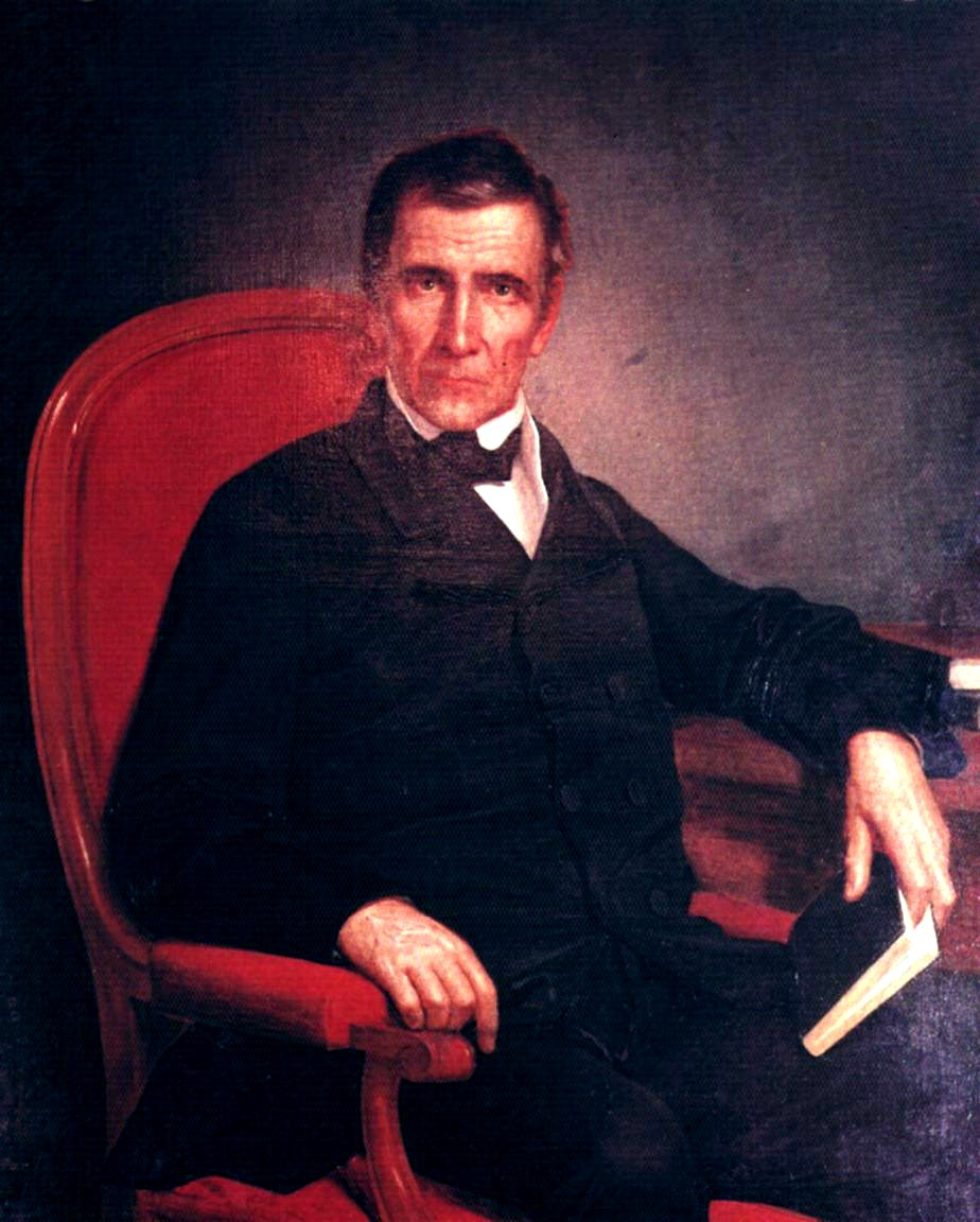 Jose Maria Vargas. Oleo sobre tela. Palacio de Miraflores.